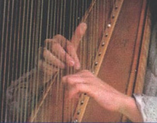 Mans de l'arpista Martine Géliot